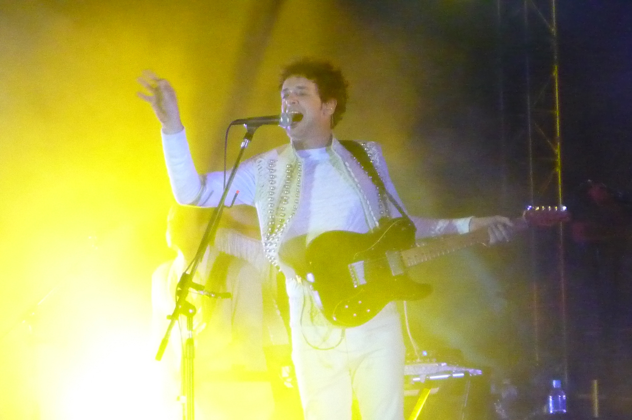 Gustavo Cerati